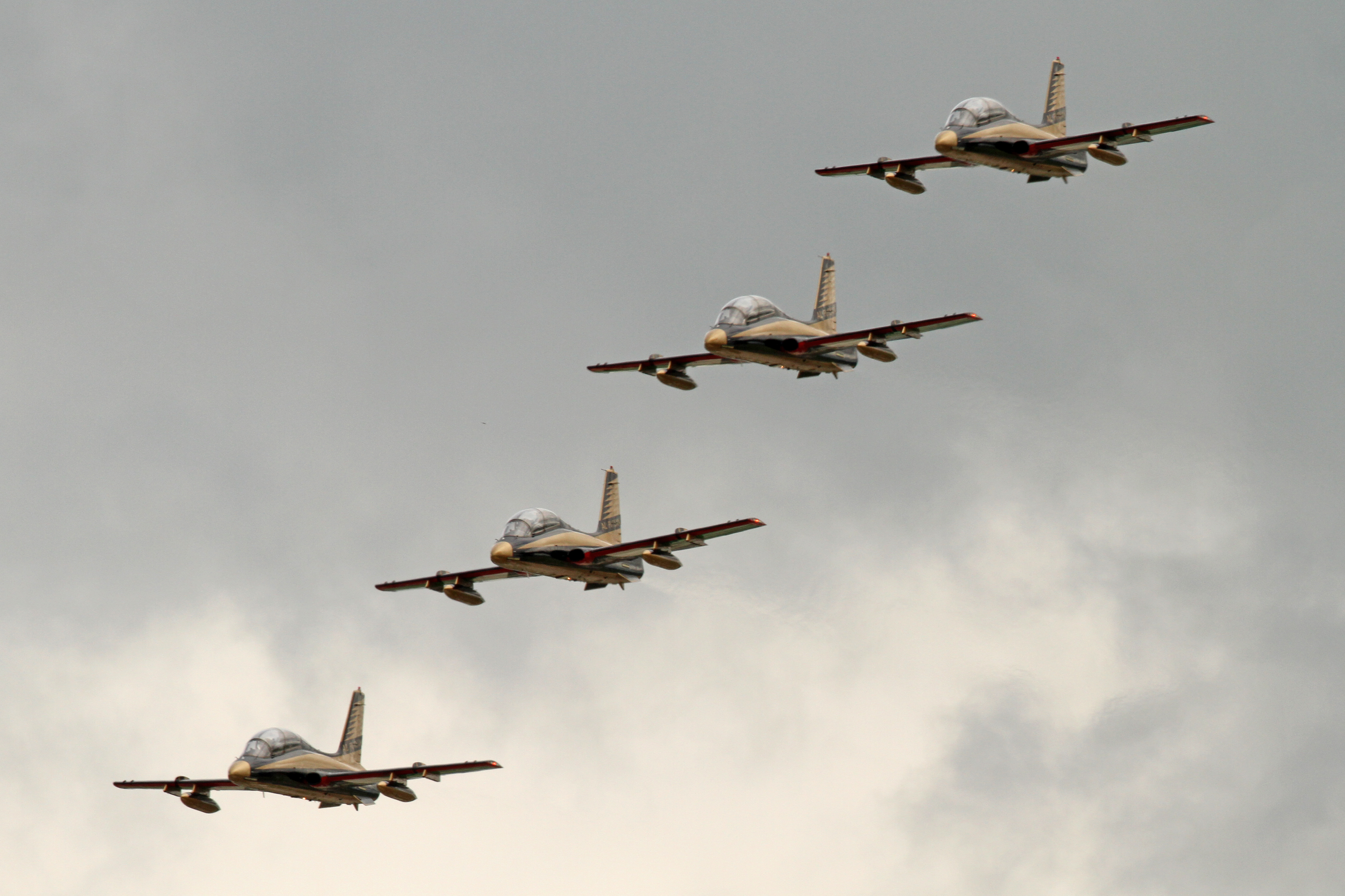 Al Fursan 10